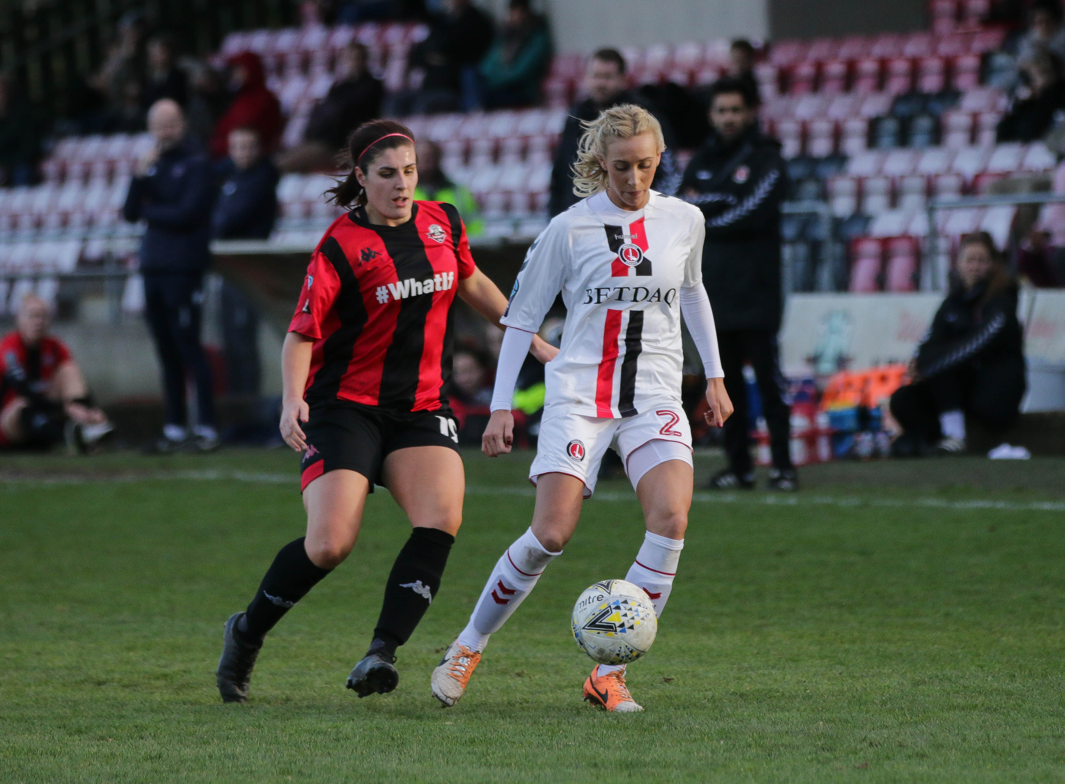 Charlotte Kerr